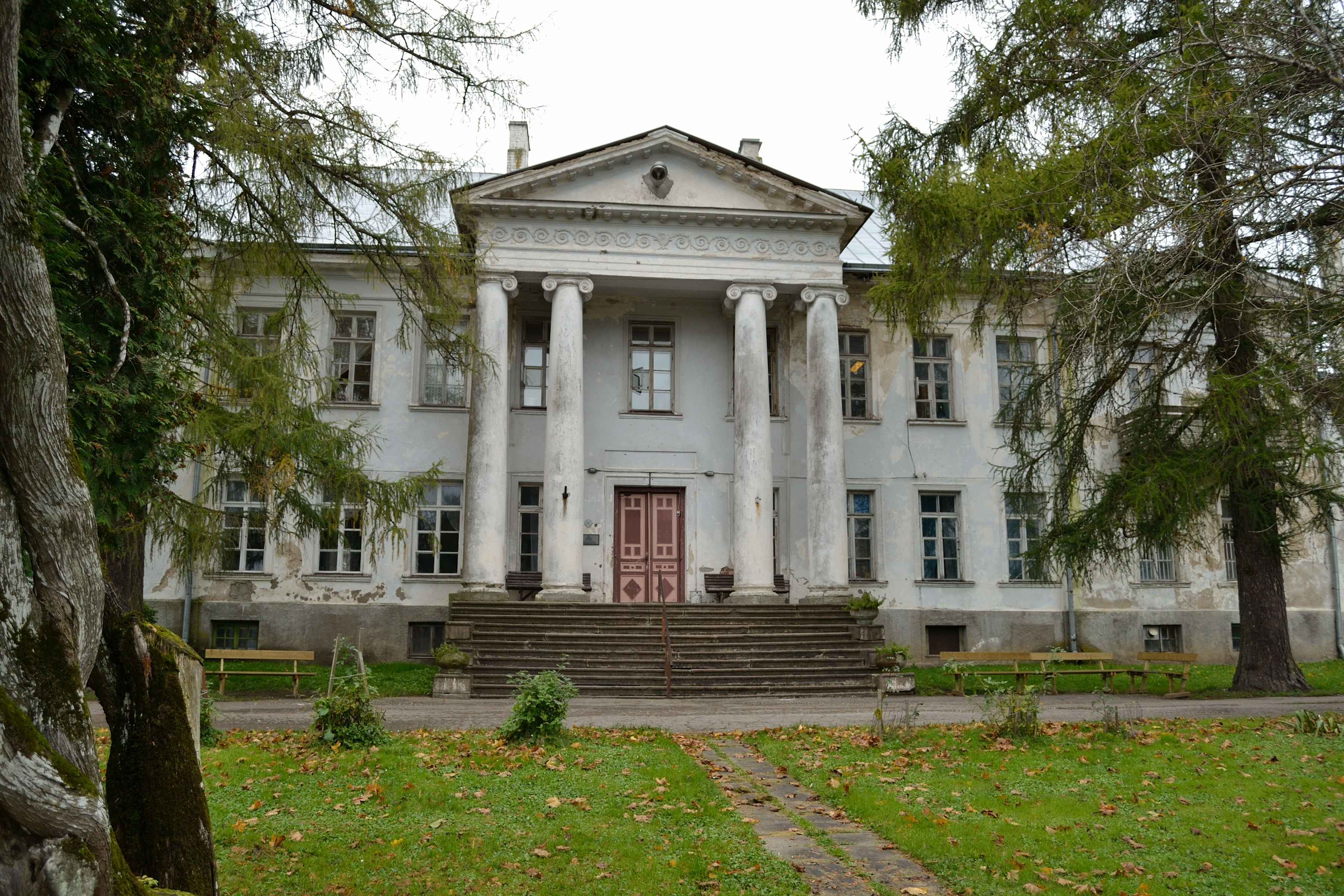 Kernu mõisa peahoone, 19.sajand